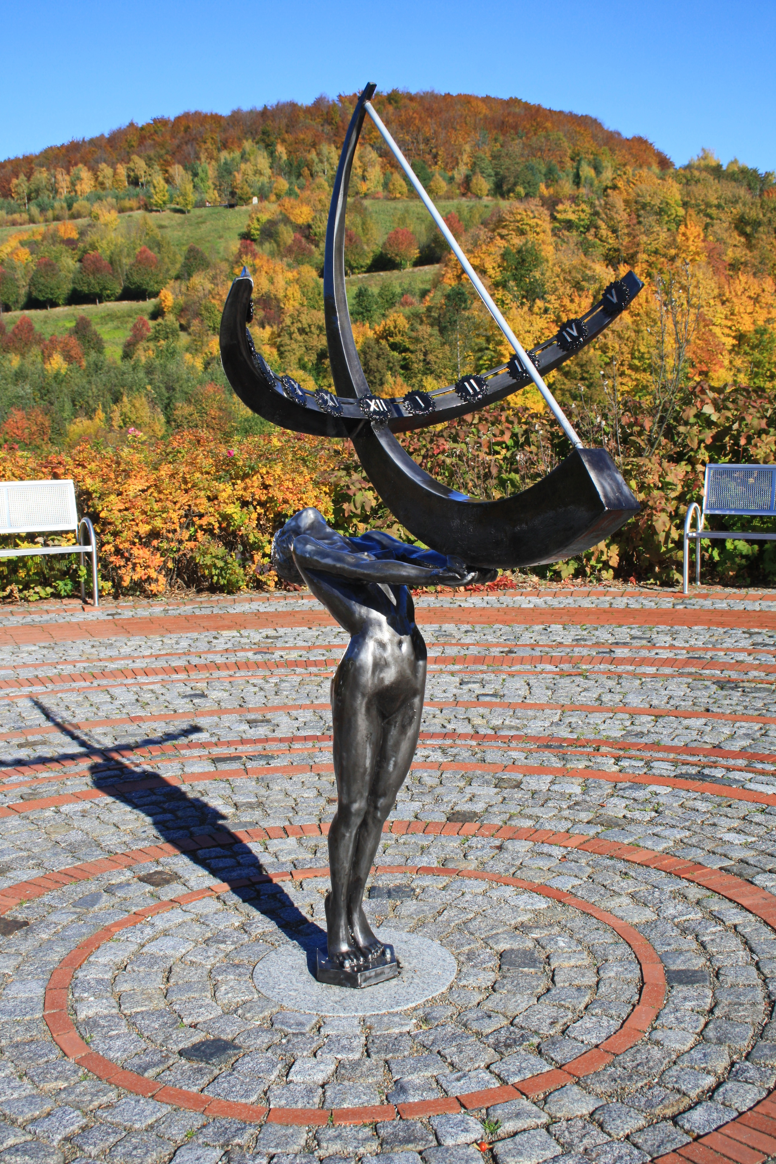 Skulptur mit Sonnenuhr im Kurpark Bad Schlema in Sachsen.